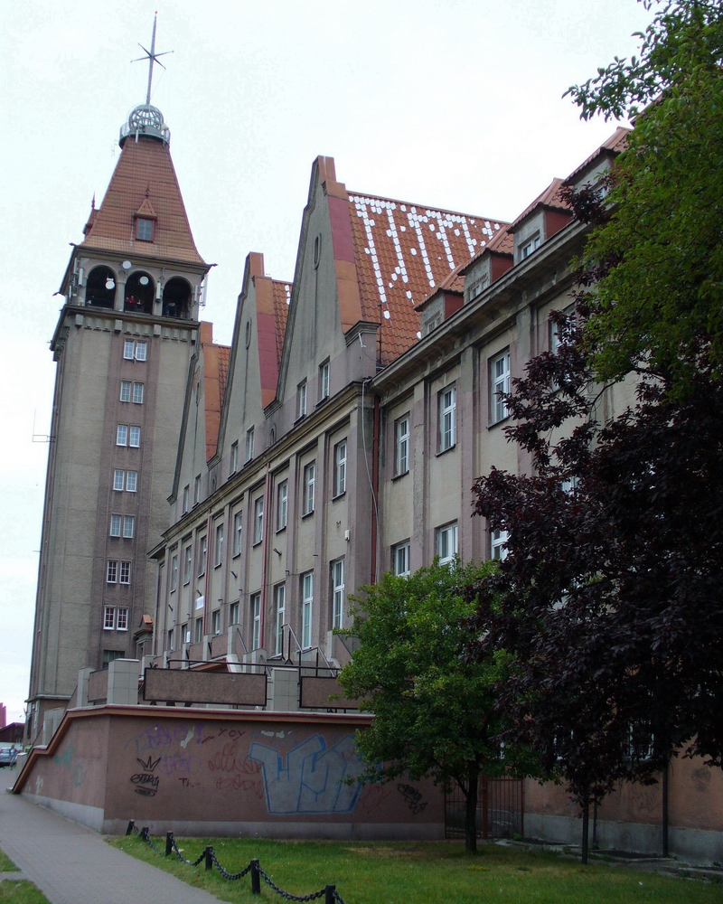 Dom Rybaka - siedziba Urzędu Miasta, Władysławowo, Polska